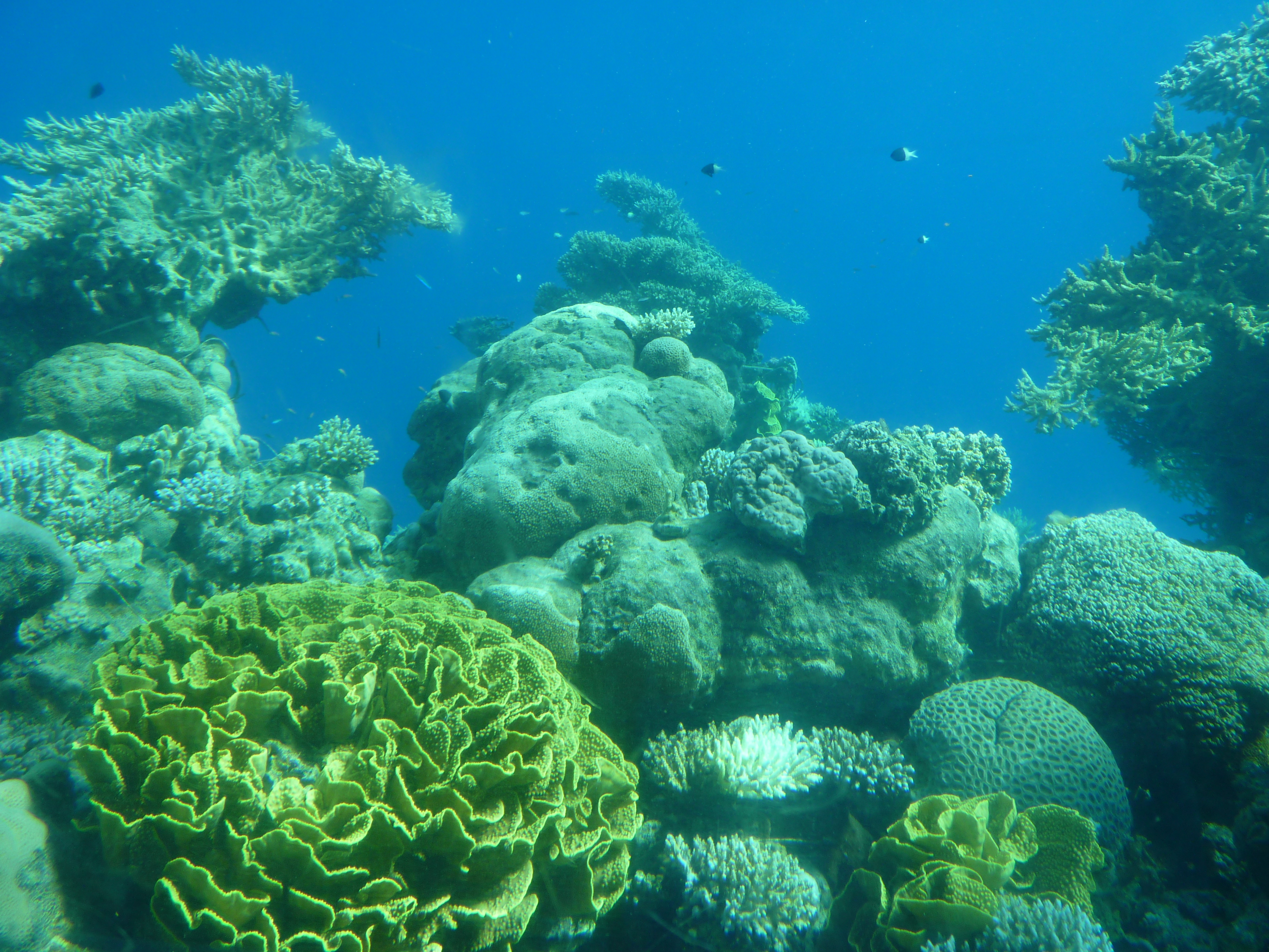 P1080799 Eilat